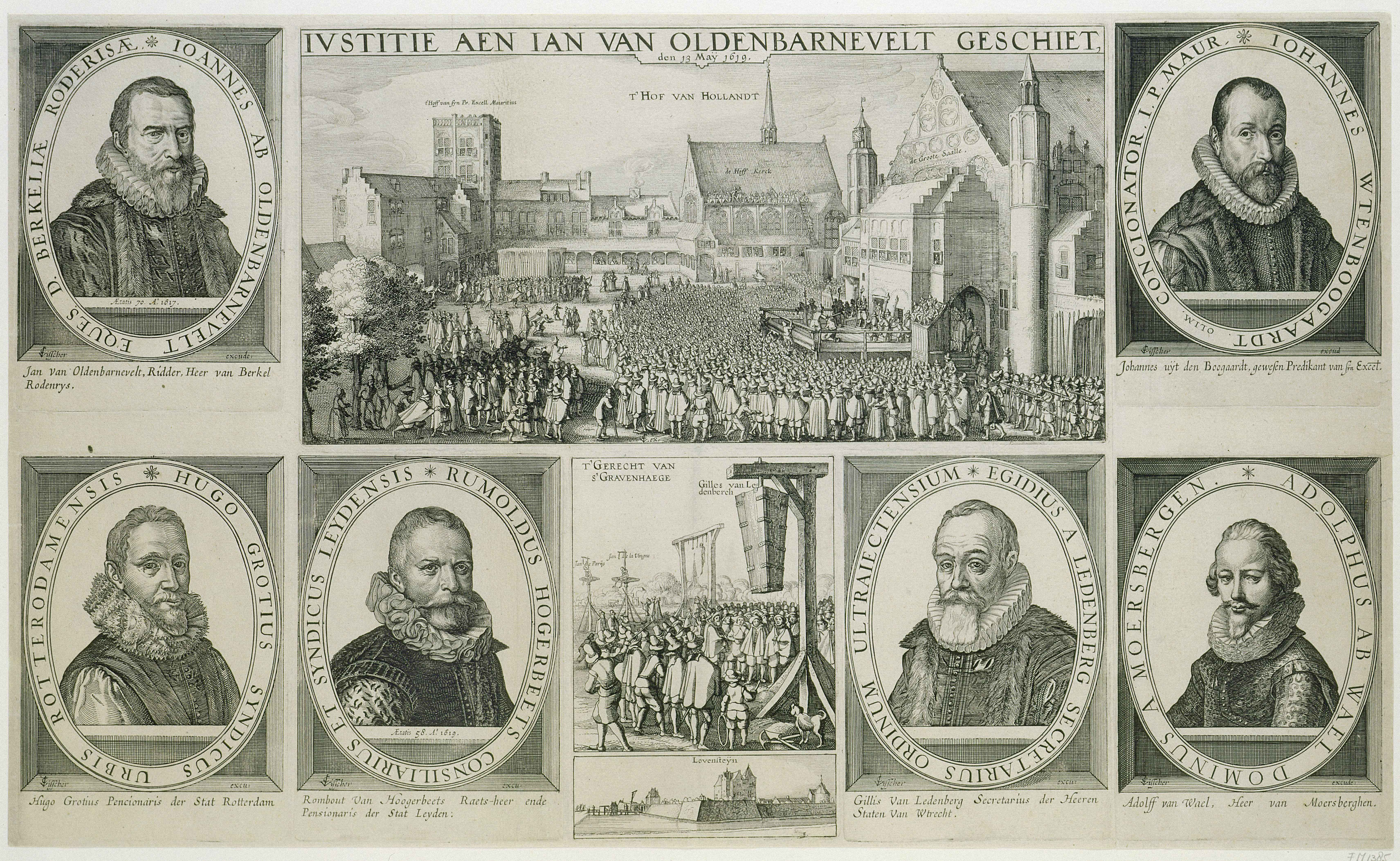 Inscriptions / Inscipties: IOHANNES AB OLDENBARNEVELT EQUES D. BERKELI Æ RODERISÆ. Ætatis 70. Ao. 1617 CIVisscher execut. Jan van Oldenbarnevelt, Ridder, Heer van Berkel Rodenrys. IVSTITIE AEN IAN VAN OLDENBARNEVELT GESCHIET, den 13 Maÿ 1619. t’Hoff van syn Pr. Excell. Mauritius R’HOFF VAN HOLLANT IOHANNES WTENBOOGAARDT. OLIM. CONCIONATOR. I. P. MAUR. CIVisscher execud. Iohannes uÿt den Boogaarde, gewesen Predikant van Sin Excel. HUGO GROTIUS SYNDICUS URBIS ROTTERDAMENSIS CIVisscher excu. Hugo Grotius Pencionaris der Stat Rotterdam RUMOLDUS HOGERBEETS CONSILARIUS ET SYNDICUS LEYDENSIS CIVisscher excu. Rombout Van Hoogerbeets Raets-heer ende Pensionaris der Stat Leyden. T’GERECHT VAN S’GRAVENHAEGE Gilles van Ledenberch [...] Lovensteÿn EGIDIUS A LEDENBERG SECRETARIUS ORDINUM ULTRAIECTENSIUM CIVischer excu. Gillis Van Ledenberg Secretarius der Heeren Staten Van Wtrecht. ADOLPHUS AB WAEL DOMINUS A MOERSBERGEN. CIVisscher excude. Adolff van Wael, Heer van Moersberghen.